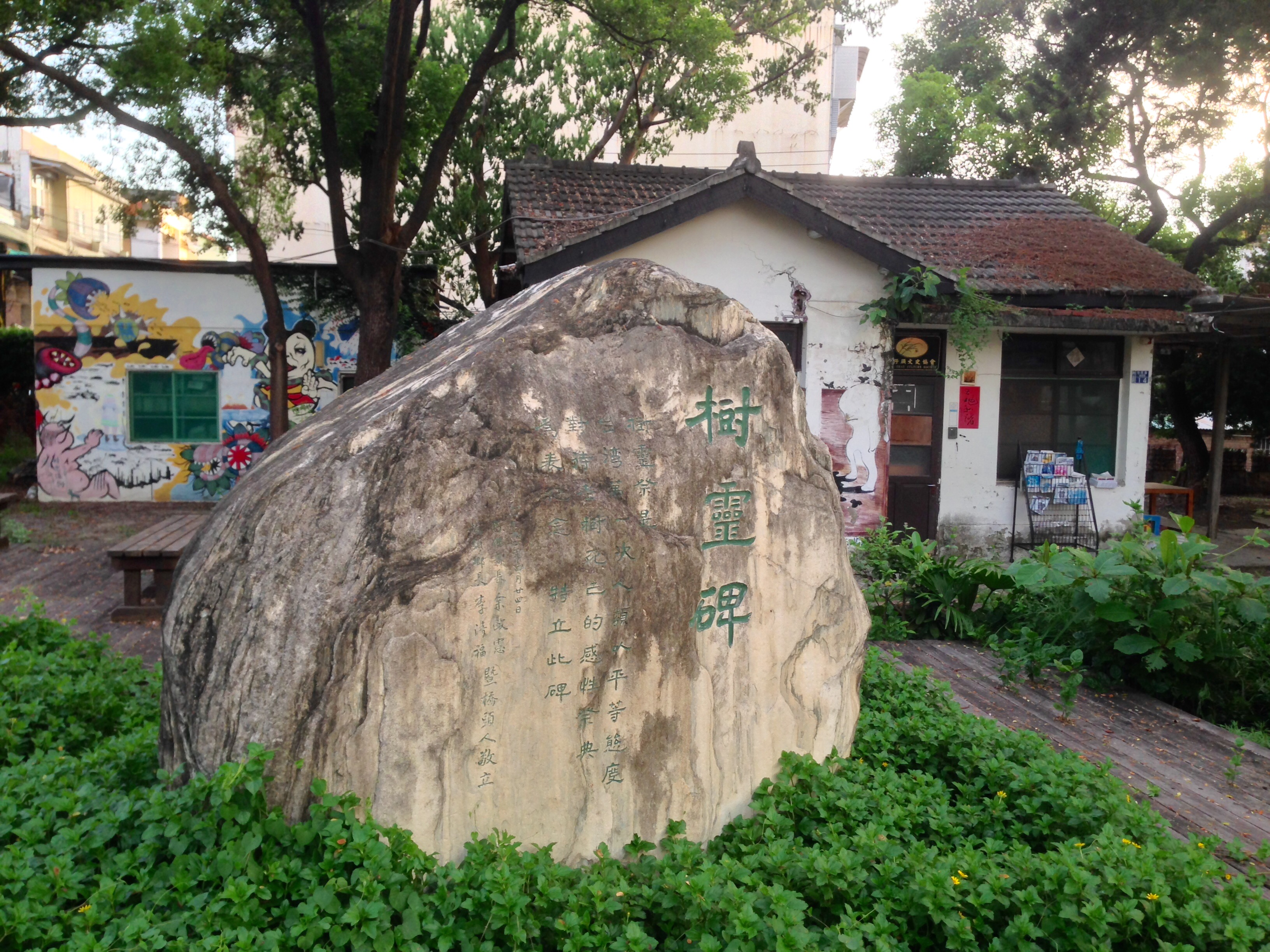 中文（台灣）: 樹靈碑與橋仔頭文史協會